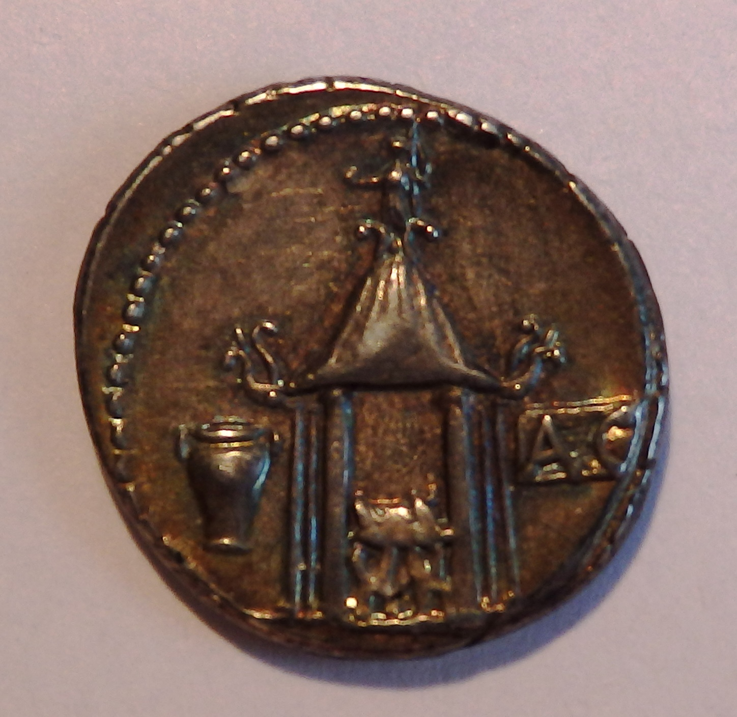 Vestatempel auf römischen Denar, 55 v. Chr, Albert 1354